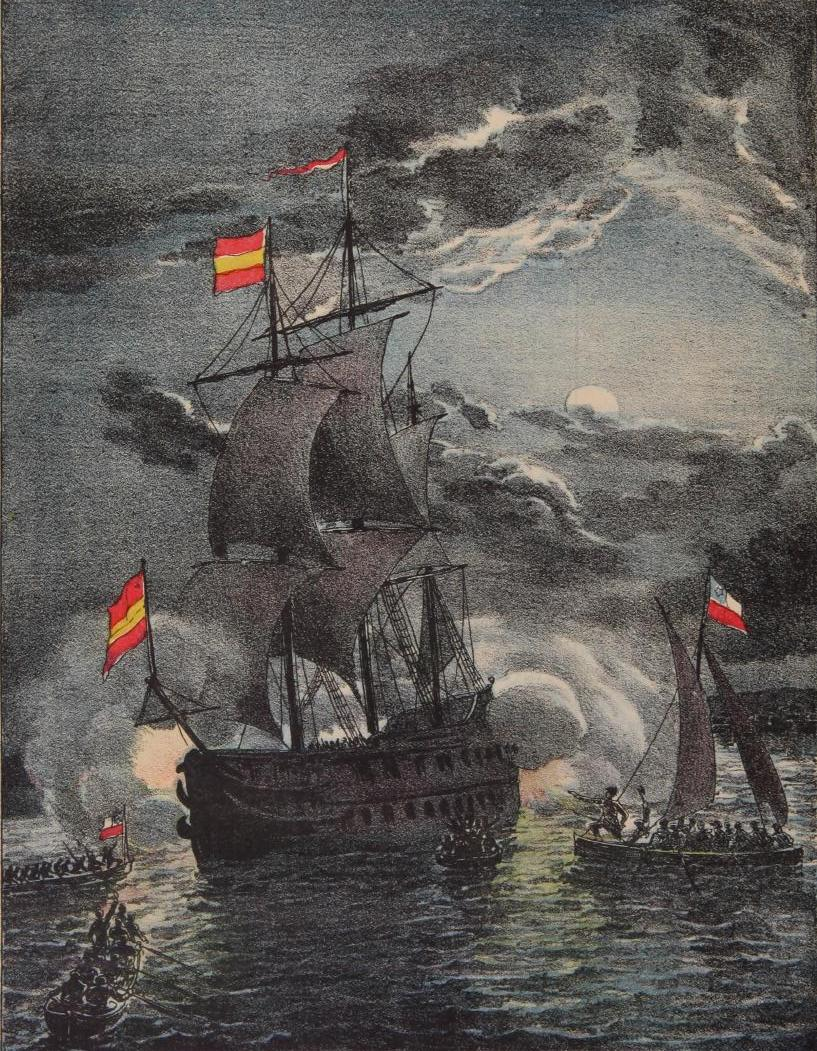 "Audaz captura de la Esmeralda en el Callao por Lord Thomas Cochrane. 5 al 6 de Noviembre de 1820."